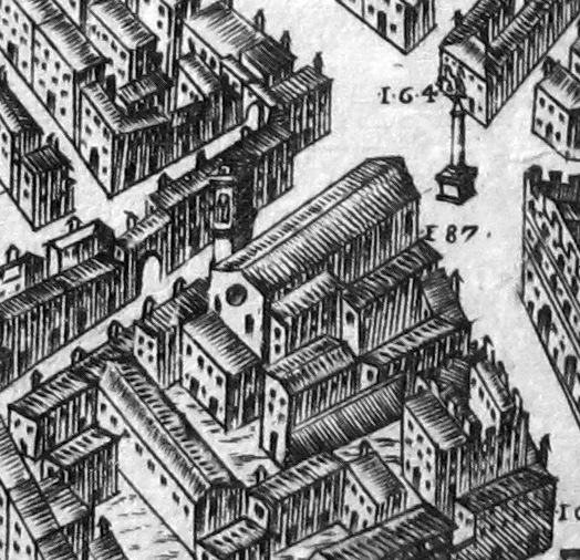 Pianta del buonsignori, dettaglio 187 santa trinita